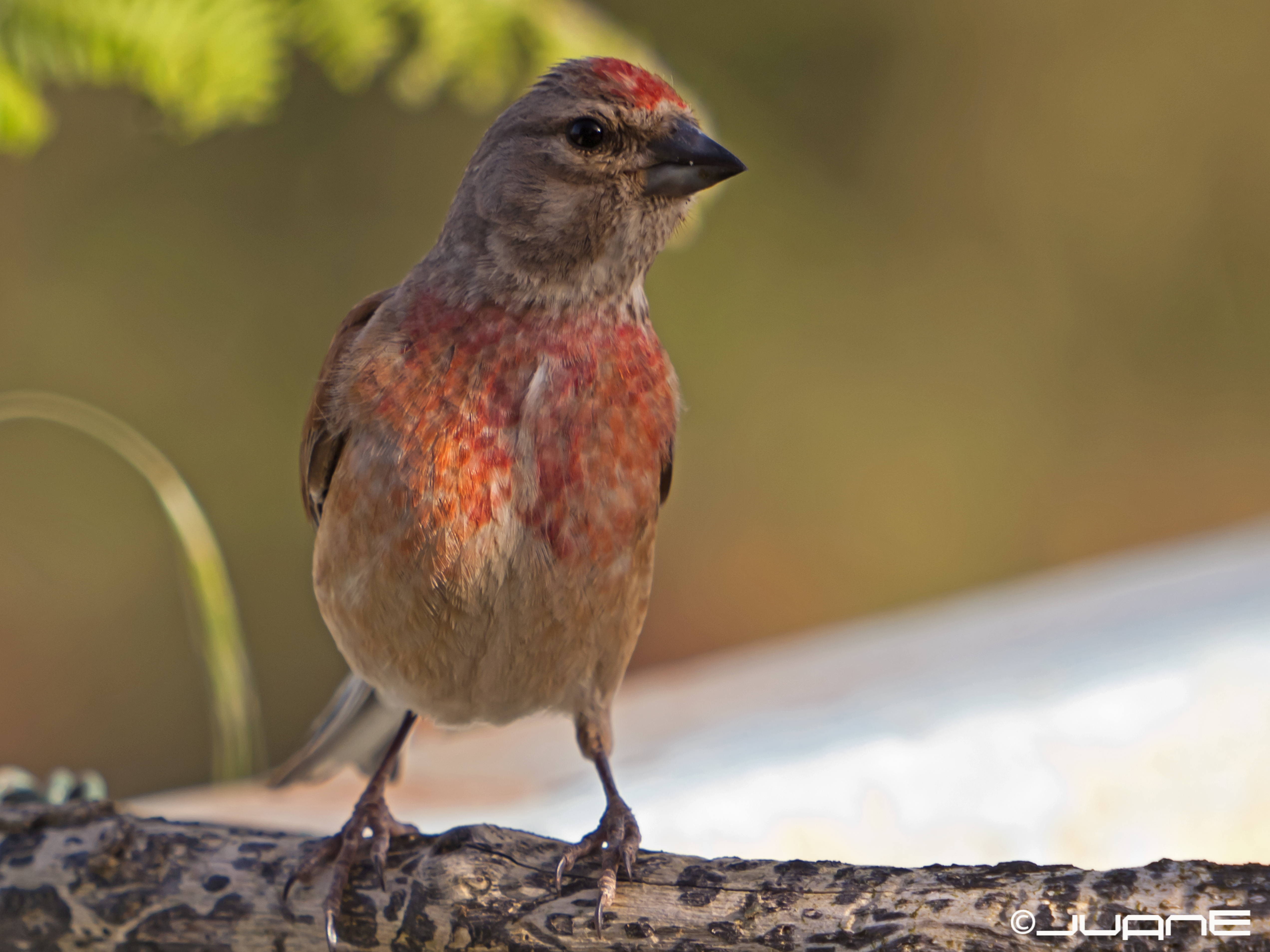 Pardillo comun - Carduelis cannabina. (♂)